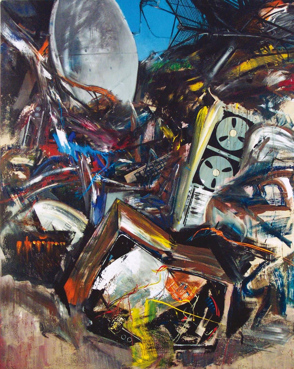 Franta, Beze zpráv (2002), akryl na plátně 230 x 185 cm